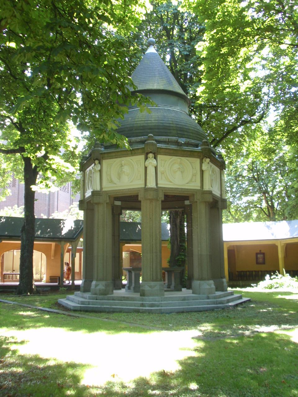 Gedenkteken op het Martelaarsveld achter de Bedevaartskerk in Brielle